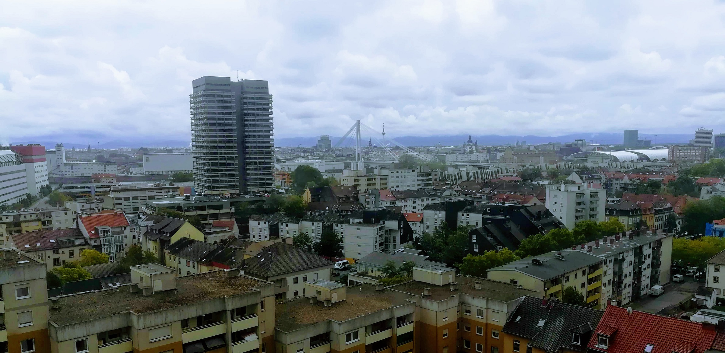 Aussichtsplattform auf dem ehemaligen Wasserturm gebaut auf dem Luftschutzbunker Rollesbunker mit Blick über Ludwigshafen. Tag des offenen Denkmals 2019. Blick südwestlich Richtung Mannheim.